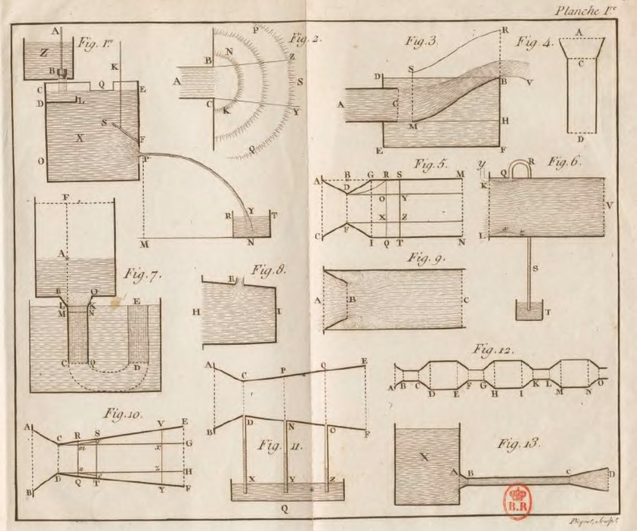 Ouvrage de G. B. Venturi sur la mécanique des fluides publié en 1797